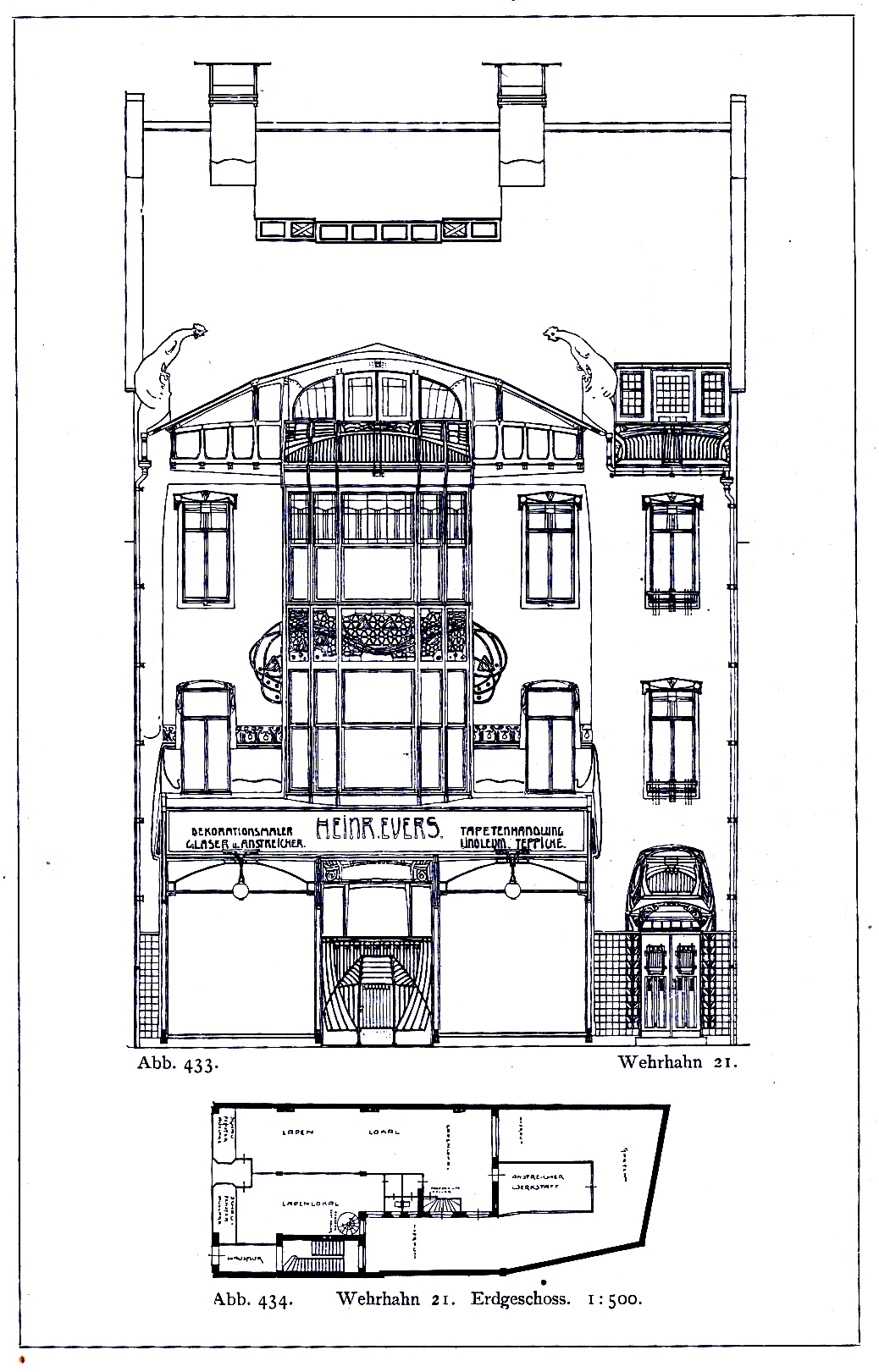 Haus Wehrhahn 21 in Düsseldorf, Evers'sches Geschäftshaus, erbaut durch den Architekten P. P. Fuchs im Jahre 1903.